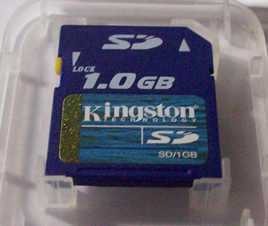 金士顿（Kingston）1GB SD卡